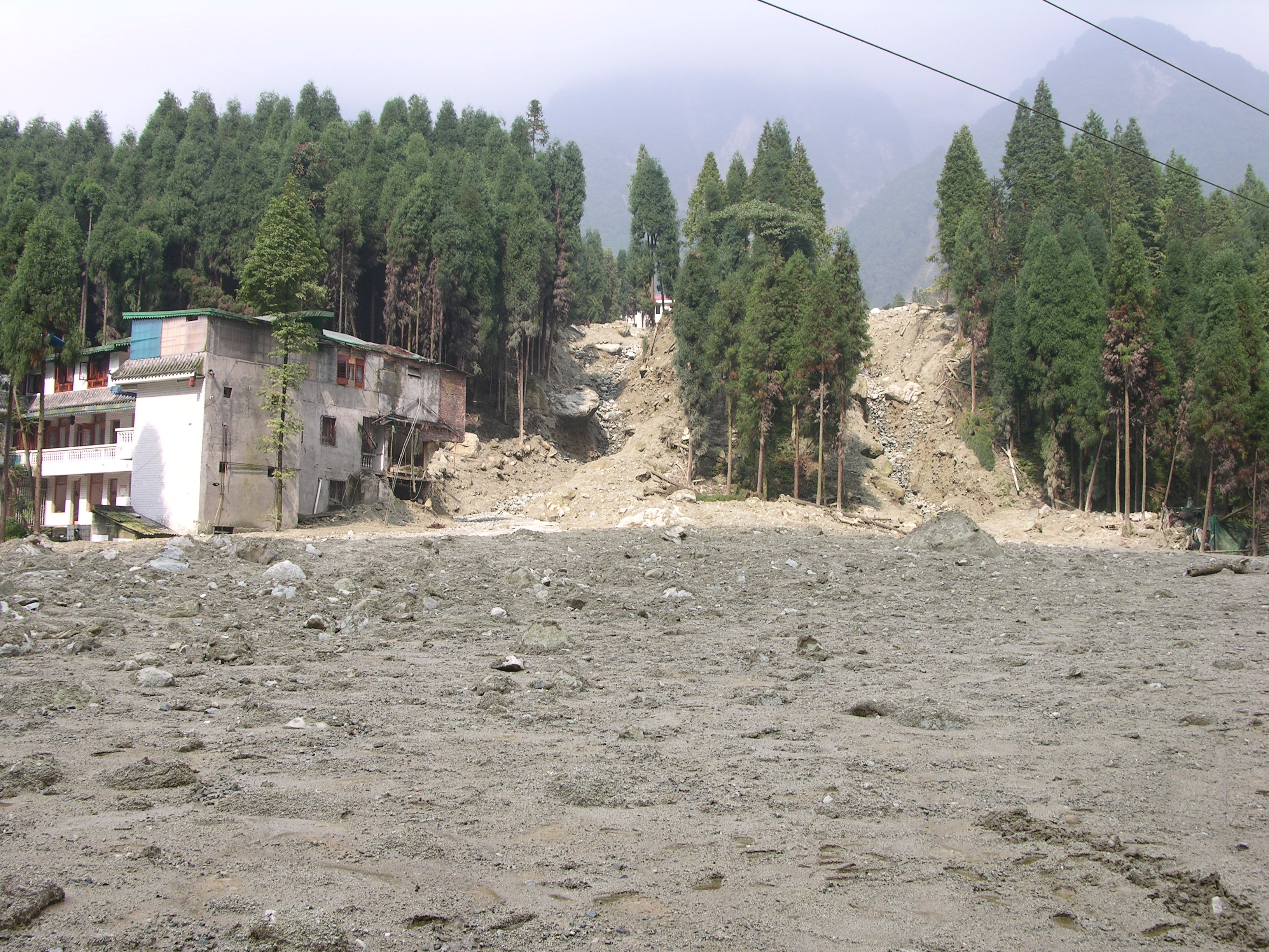 A6 银厂沟 liuzusai